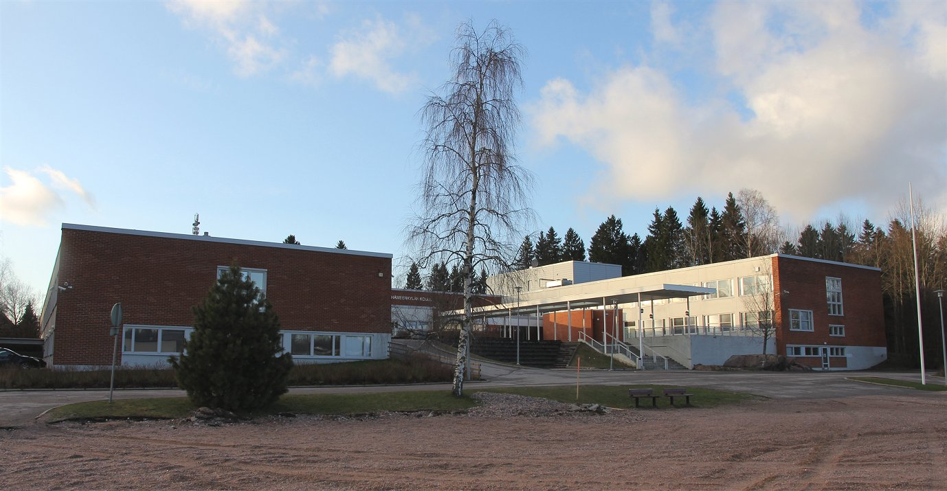 Hämeenkylän koulu on Vantaan Variston kaupunginosassa sijaitseva suomenkielinen yhtenäiskoulu. Kouluun kuului keväällä 2016 kaksi rakennuskokonaisuutta: pienempi Variston opetuspiste osoitteessa Varistontie 1 ja suurempi Hämeenkylän koulu osoitteessa Varistontie 3. Huhtikuussa 2016 Vantaan kaupunki päätti purkaa kuvan suuremman koulurakennuksen vakavien sisäilmaongelmien vuoksi.